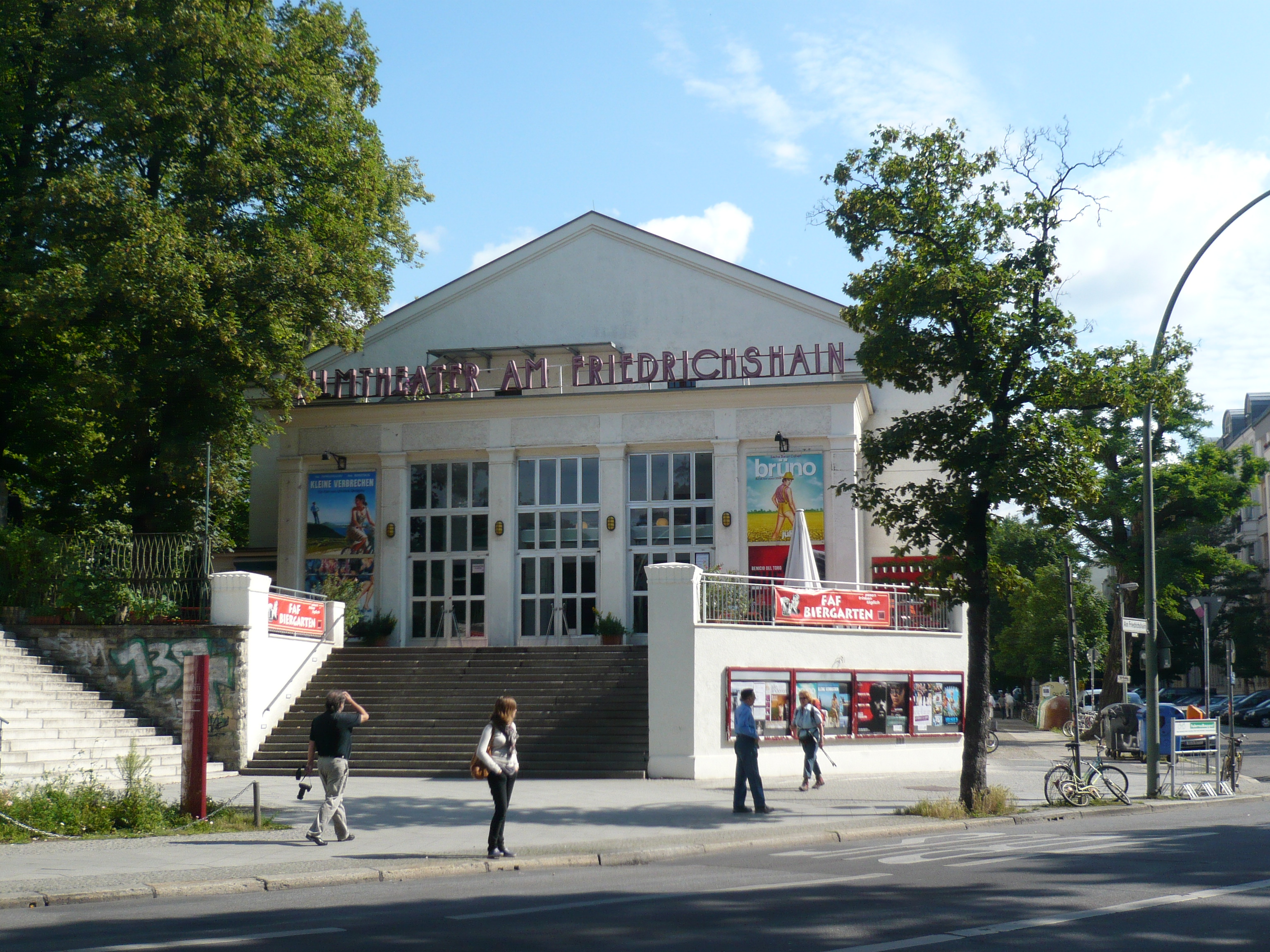 Filmtheater am Friedrichshain, Eingangsseite